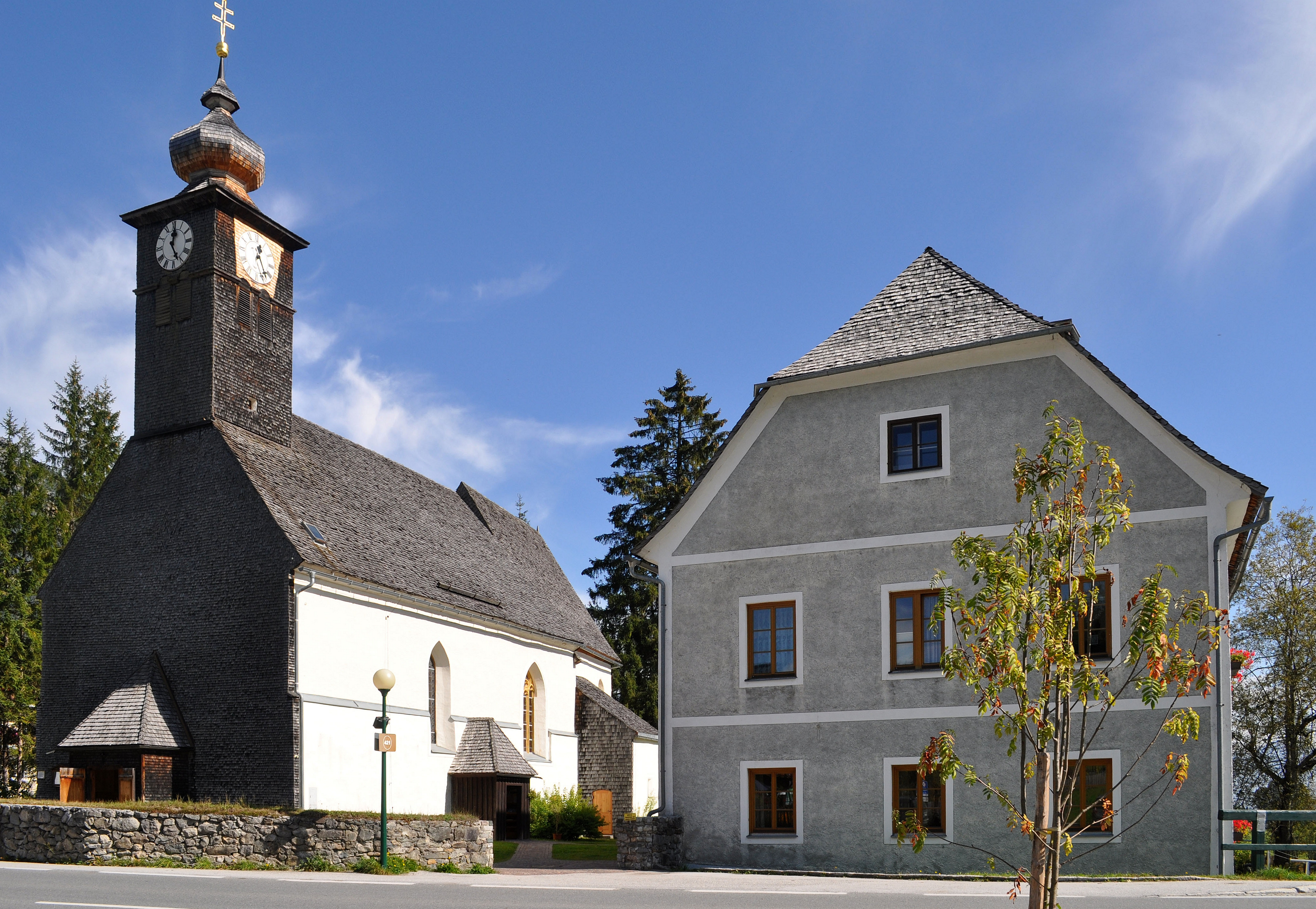 Kath. Pfarrkirche hl. Rupert mit Friedhof, Ramsau am Dachstein